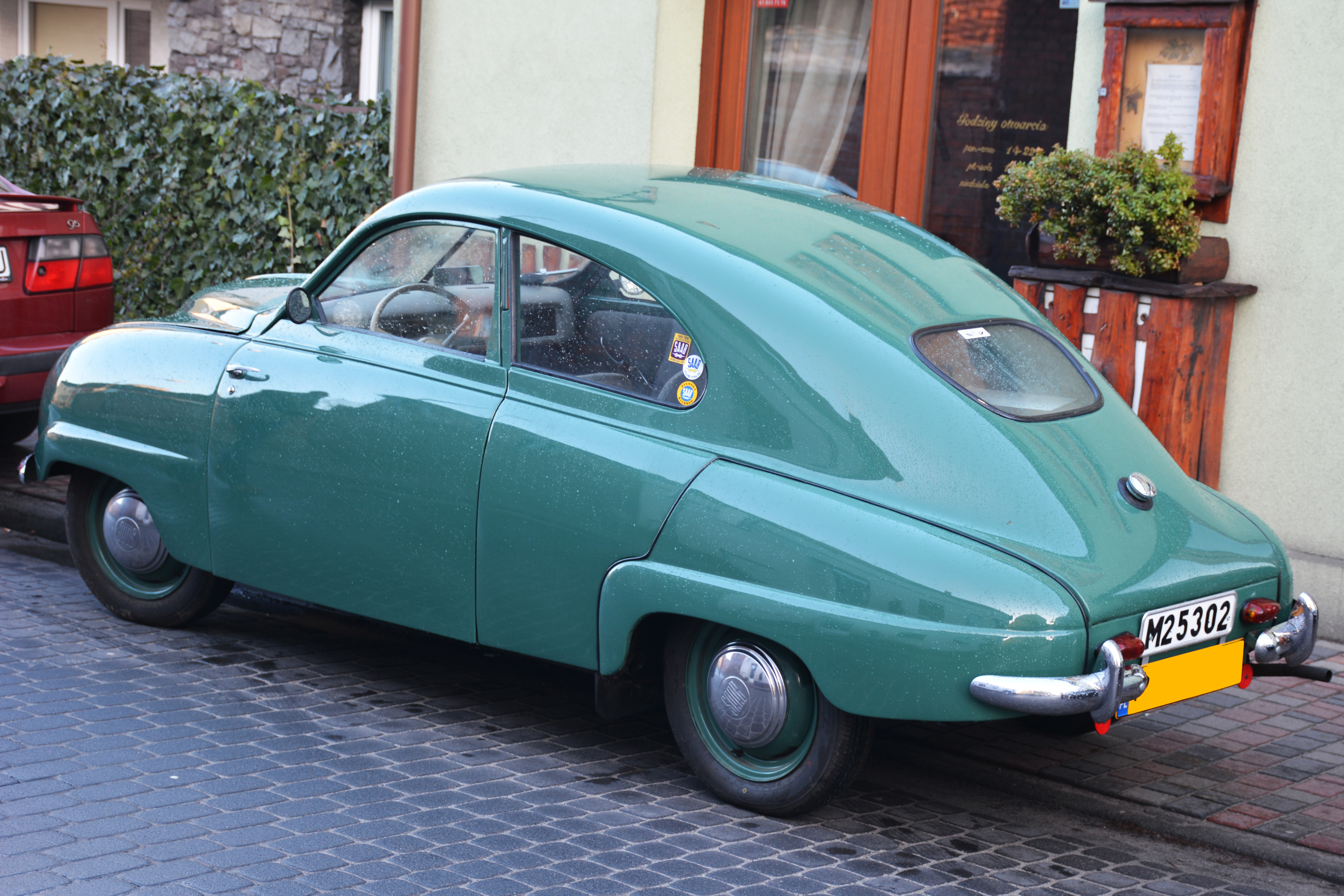 Tył Saaba 92